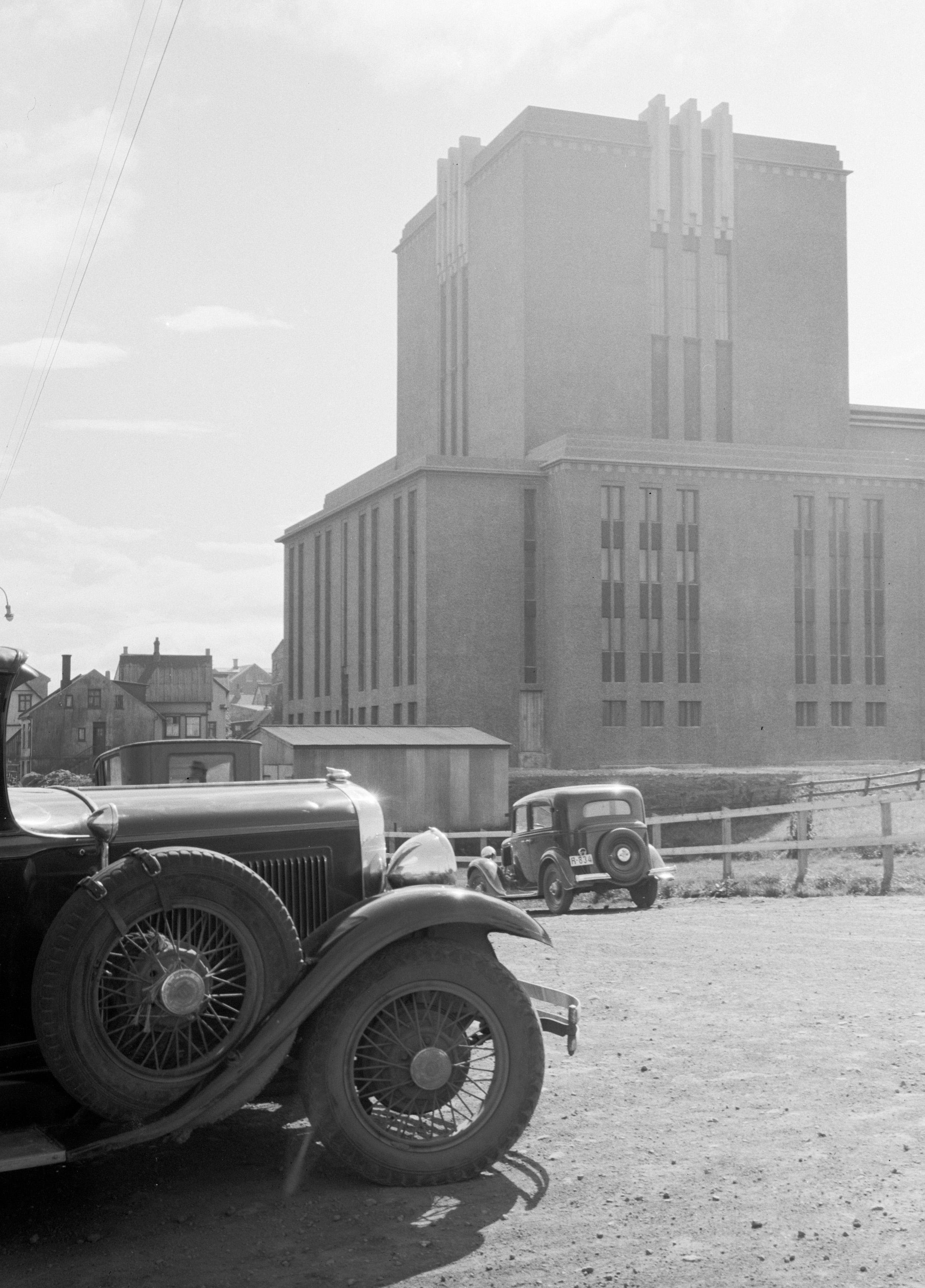 Collectie / Archief : Fotocollectie Van de Poll Reportage / Serie : IJsland Beschrijving : Reykjavik. Toneeltoren van de Stadsschouwburg. Links een personenauto met een reservewiel naast de motorkap Datum : 1934 Locatie : IJsland, Reykjavik Trefwoorden : architectuur, auto's, schouwburgen, stadsbeelden Fotograaf : Poll, Willem van de Auteursrechthebbende : Nationaal Archief Materiaalsoort : Glasnegatief Nummer archiefinventaris : bekijk toegang 2.24.14.02 Bestanddeelnummer : 190-0442